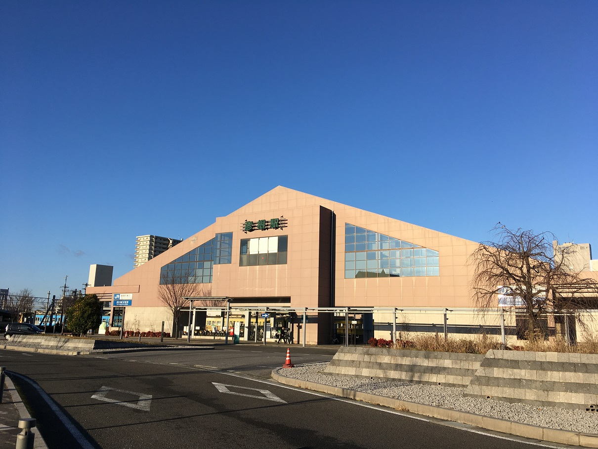 彦根駅東口